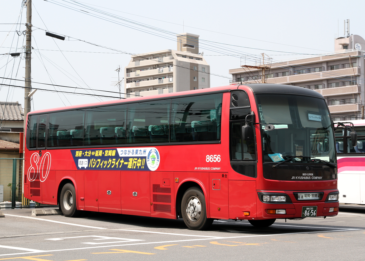 登録番号 宮崎230い86-56 社番：748-06556 JR九州バス㈱宮崎支店所属 昼行高速路線用車両 大分新川にて撮影 撮影者 Zondag2000